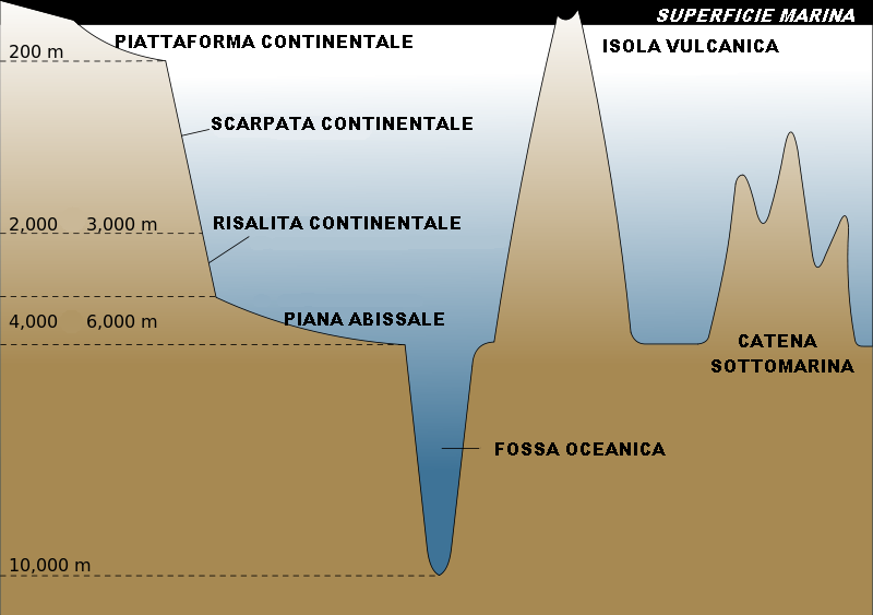 Schema delle varie parti che compongono un bacino oceanico